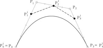 Zvyseni stupne